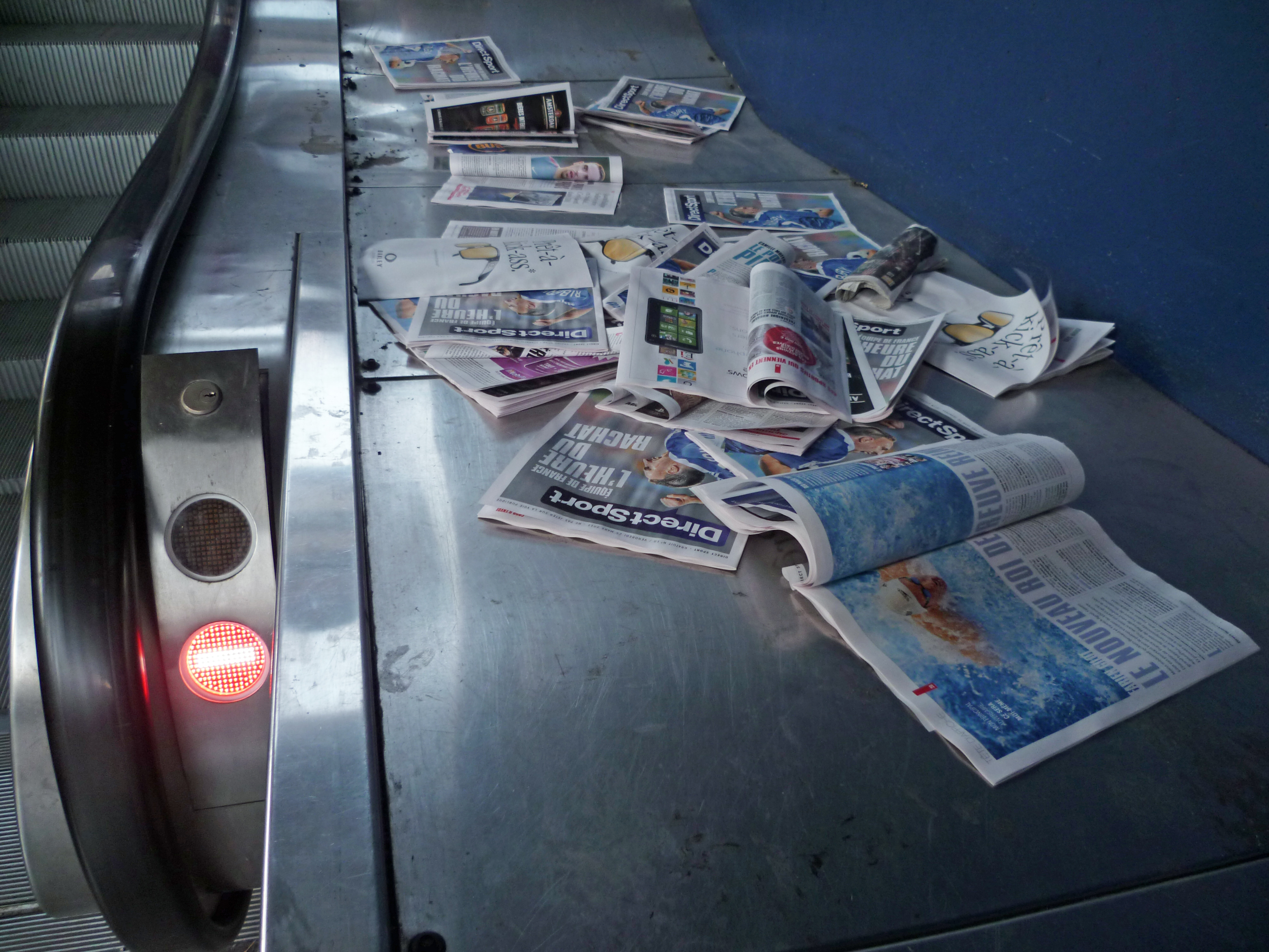 Toulouse (Haute-Garonne, Midi-Pyrénées, France) : Journaux gratuits abandonnés à la station Arènes.